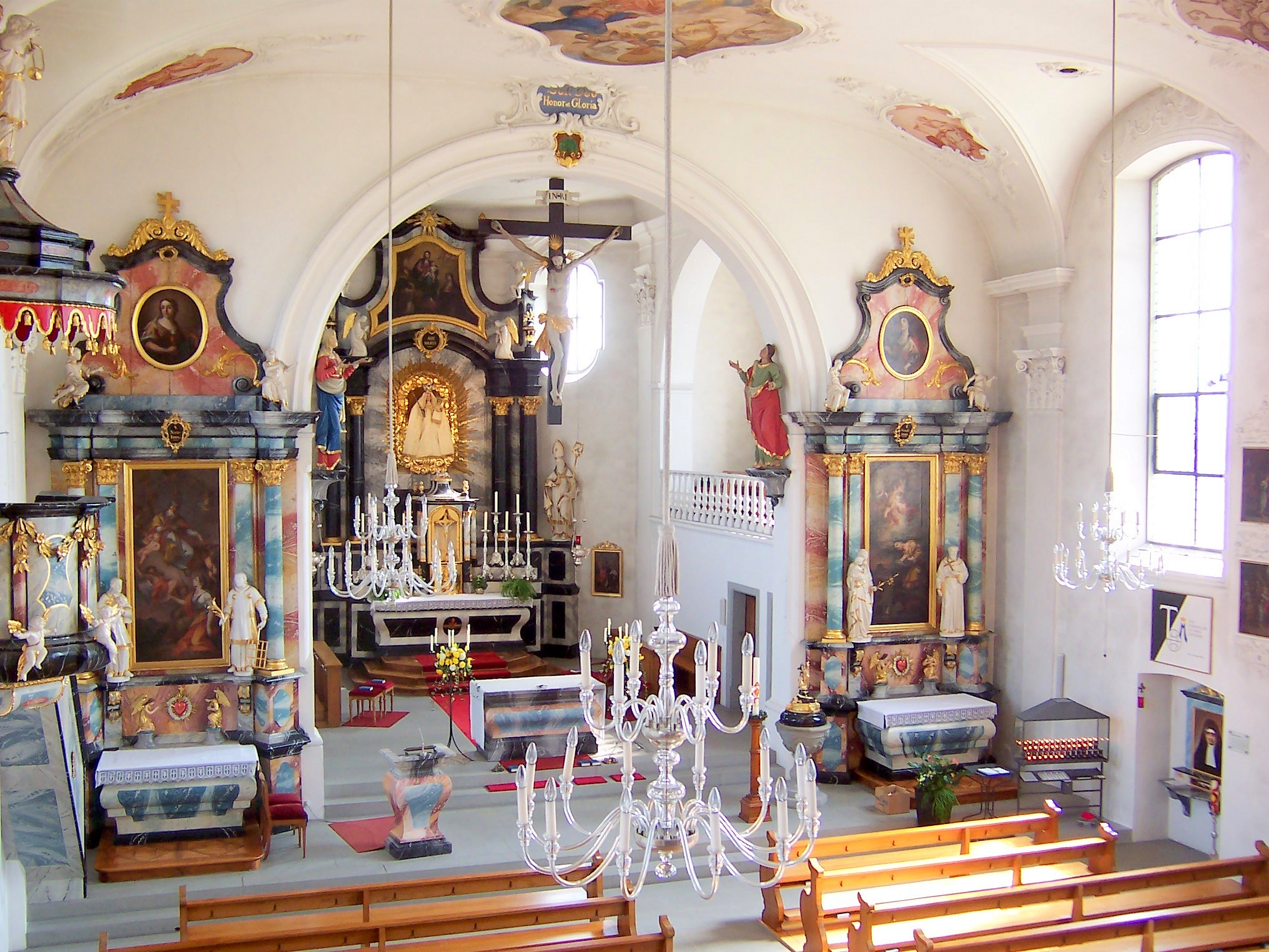 Pfarrkirche St.Nikolaus Innenansicht mit dem Altar der Heiligen Maria Bernarda Bütler an ihrem Geburtsort Auw, Kanton Aargau, Schweiz.